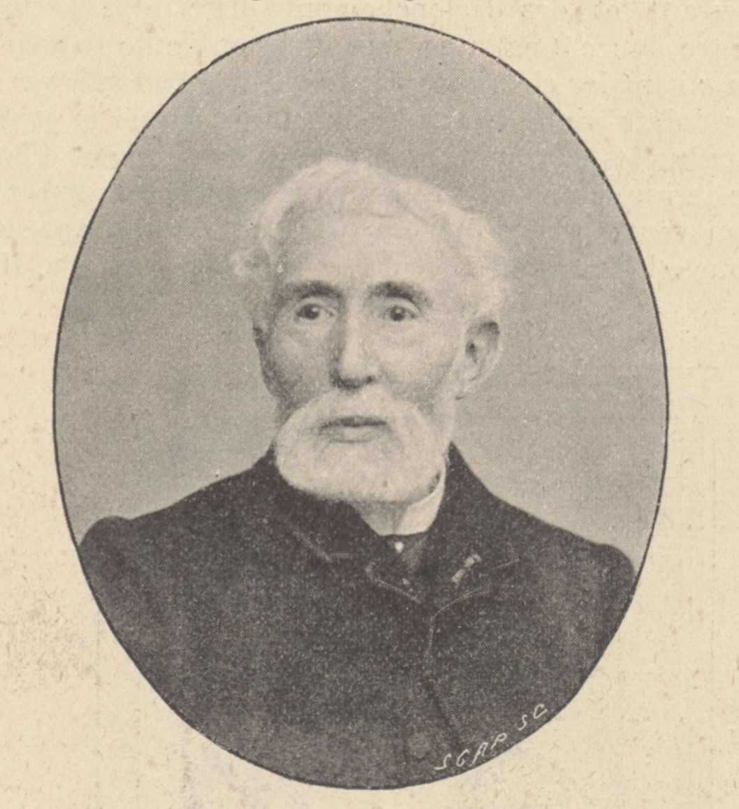 Portrait d'Eugène Ritt par Benque, paru dans " Le Monde illustré" de janvier 1898